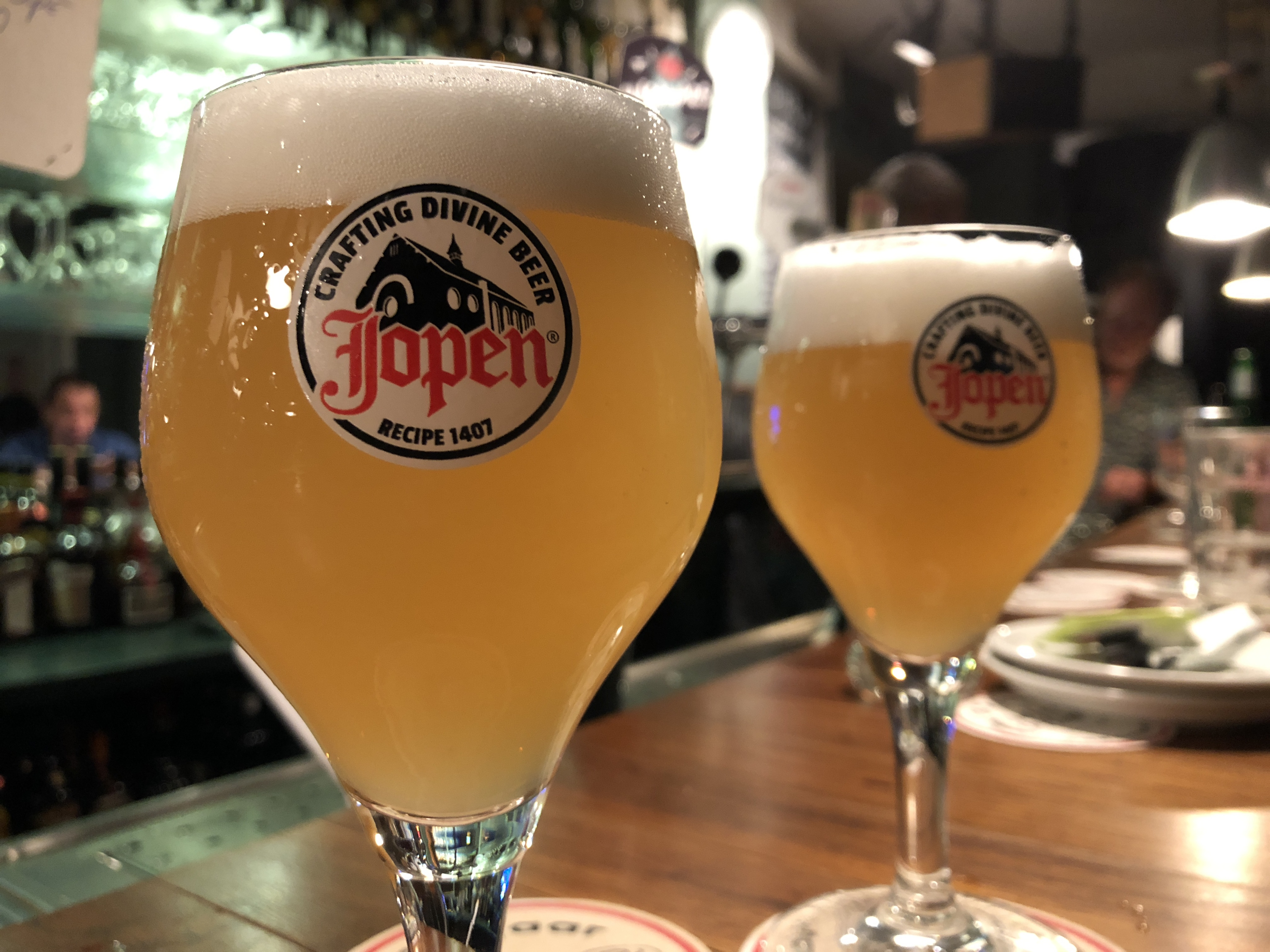 2 maal graag